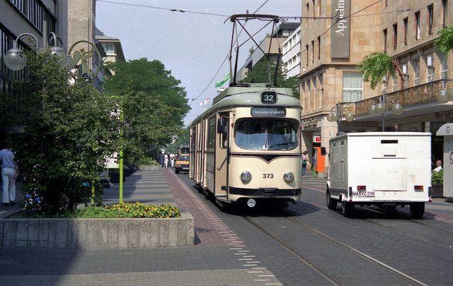 Mannheim: Tram on Planken